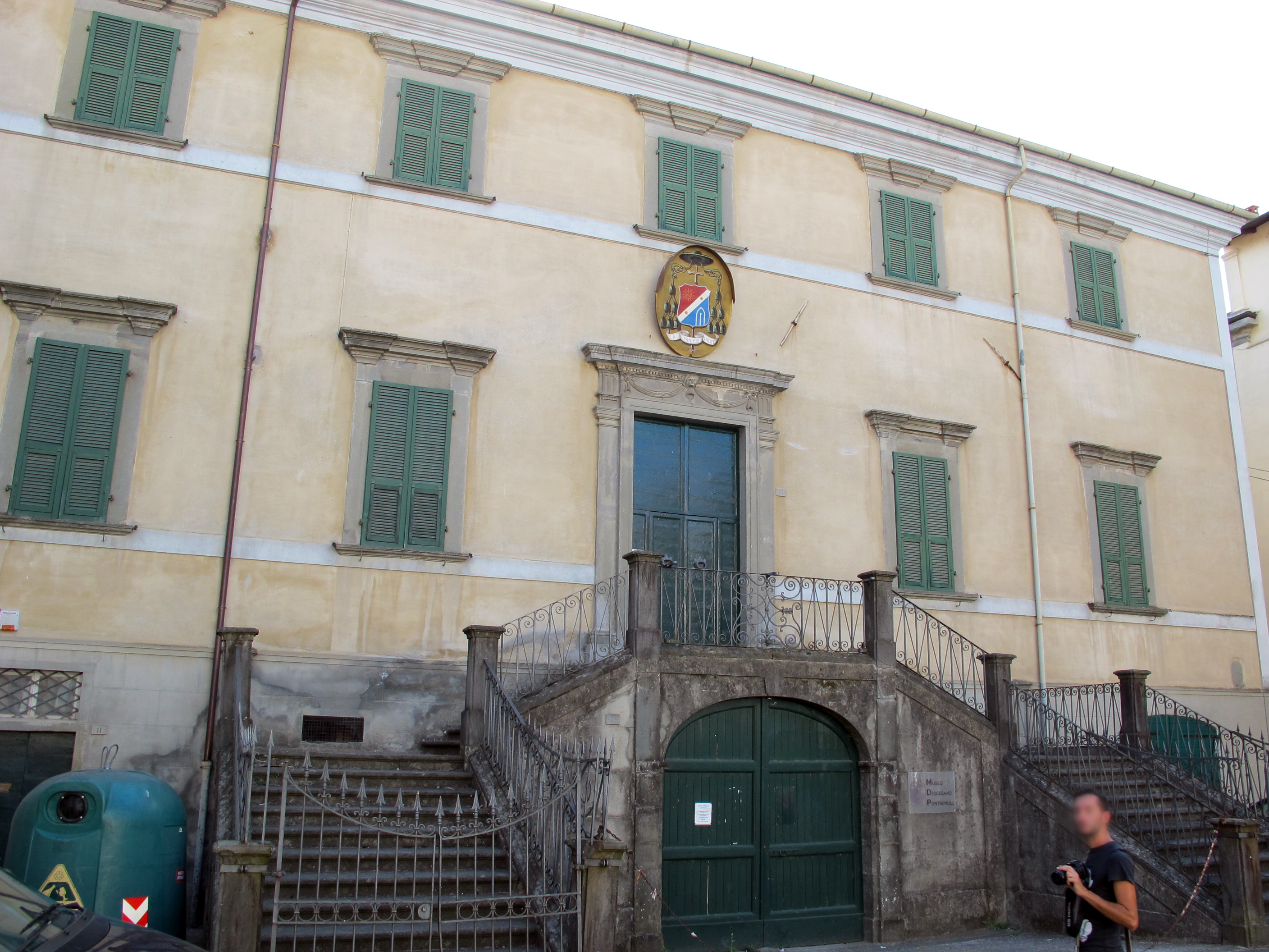 Pontremoli, piazza di sopra, palazzo vescoviloe e museo diocesano